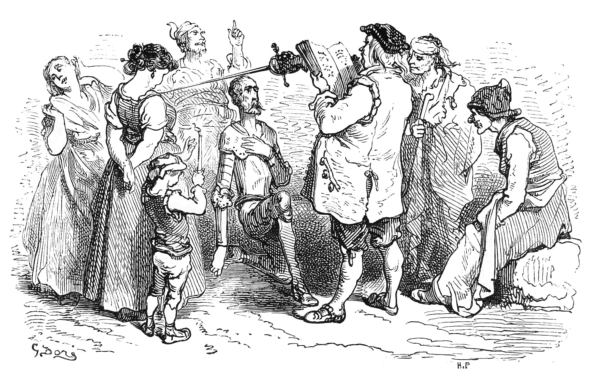 "Dom Quixote armado cavaleiro" iIustração por Gustave Doré para “Don Quixote“ de Miguel de Cervantes.